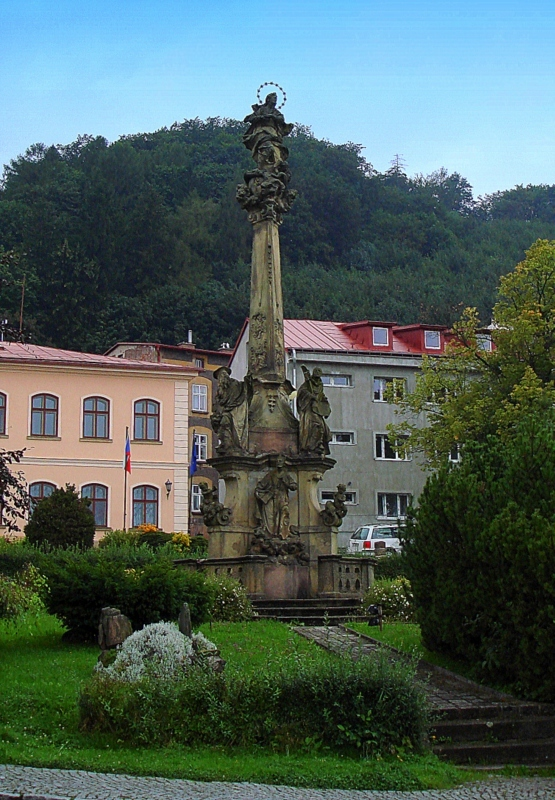 Zaclerz,Słup Mariański na Placu Rychorskim